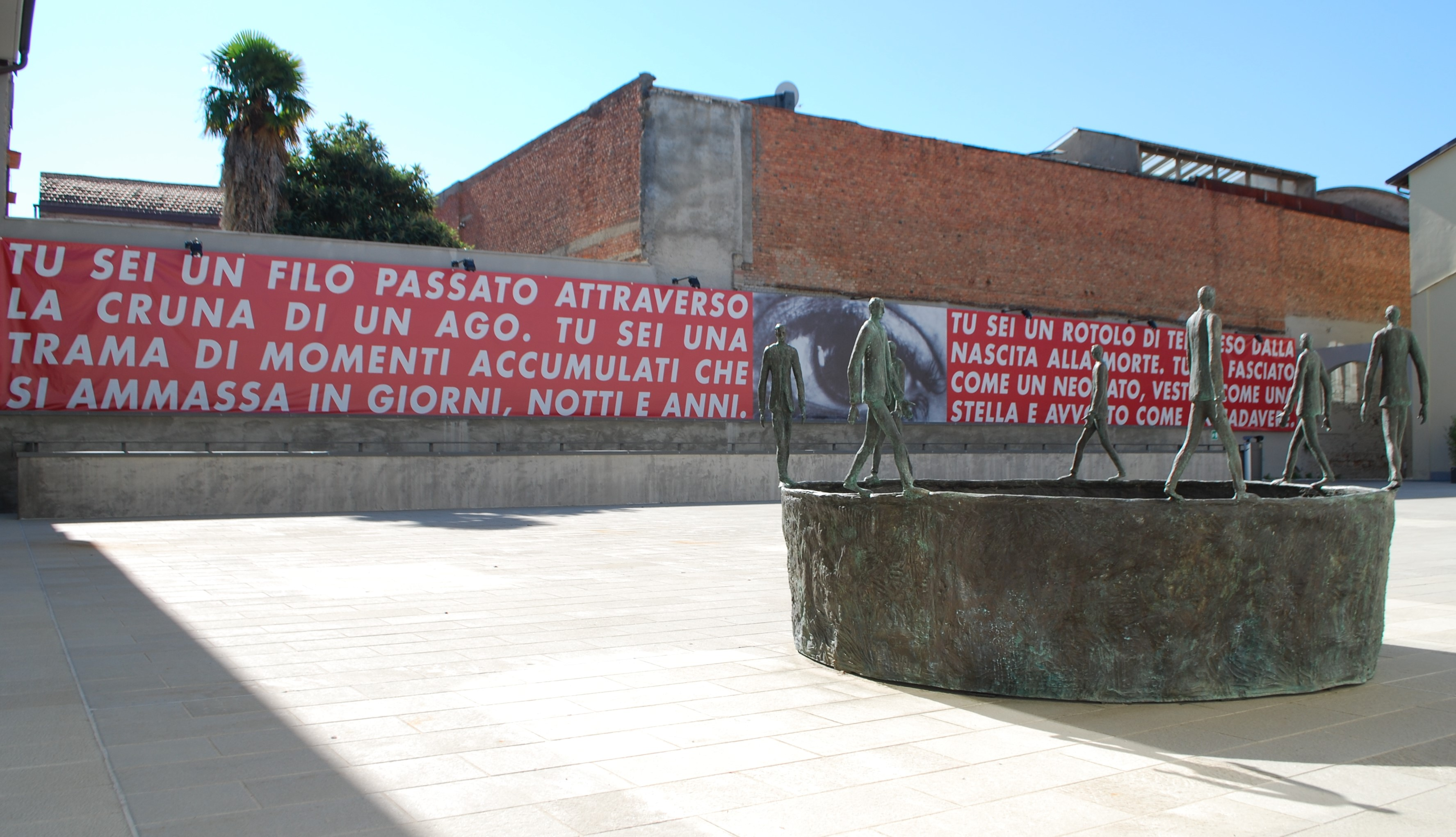 opere d'arte all'esterno della Biblioteca Lazzerini, Senza titolo (Barbara Kruger) e Senza titolo (Barbara Kruger) (Roberto Barni) (codice 09G9990005) This is a photo of a monument which is part of cultural heritage of Italy.